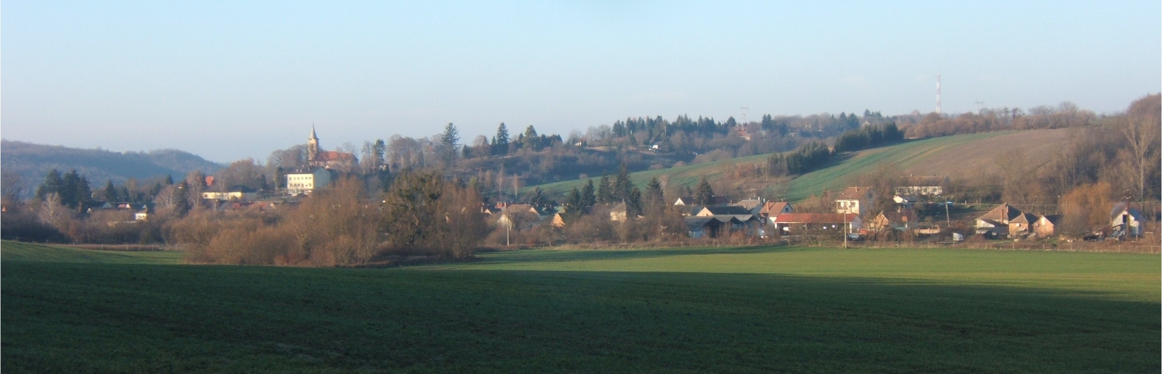 Szentbalázs látképe